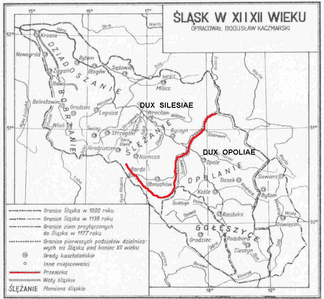 Przebieg Przesieki Śląskiej w średniowieczu